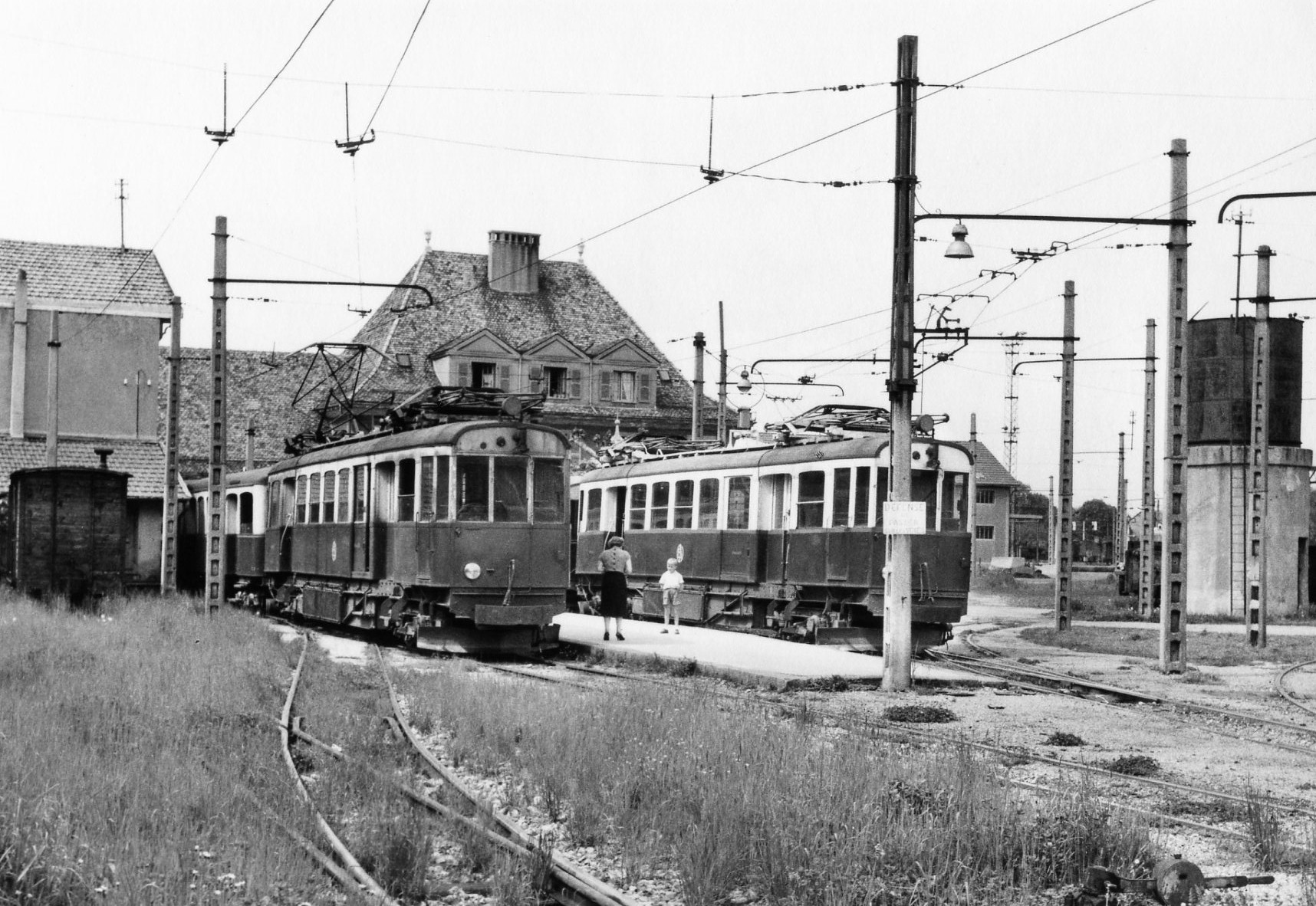 Photo: J. PAILLARD Gare d'Annemasse en 1955. Exploitée par les chemins de fer économiques du Nord, cette ligne à voie métrique fut ouverte en 1892 jusqu'à Samoëns, le prolongement à Sixt n'intervint qu'après 1914. Longue de 49 km, elle se déployait le long de la vallée du Giffre. Partant d'Annemasse à 430 m d'altitude, elle culminait à Sixt à 757 m. Deux antennes furent construites, permettant de rejoindre la vallée de l'Arve (ndlr). L'une de Bonne sur Menoge-Bonneville, l'autre de Saint-Jeoire à Marignier. Toutes deux disparurent avant 1939. Deux autres ne furent jamais achevées. Celle du Pont de Fillinges à Habère-Poche, qui aurait permis une desserte de la vallée Verte, et celle de Taninges à Morzine. Une douzaine de trains circulaient quotidiennement, effectuant le parcours entre 1 h 30 et 1 h 50. Fin de l'exploitation le 14 mai 1959.